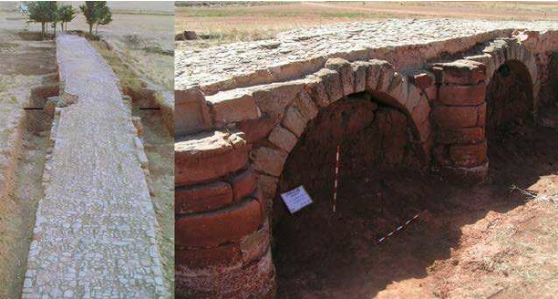 Foto aérea del Puente de Triviño y de la arcada de la zona tras las ultimas excavaciones arqueológicas.